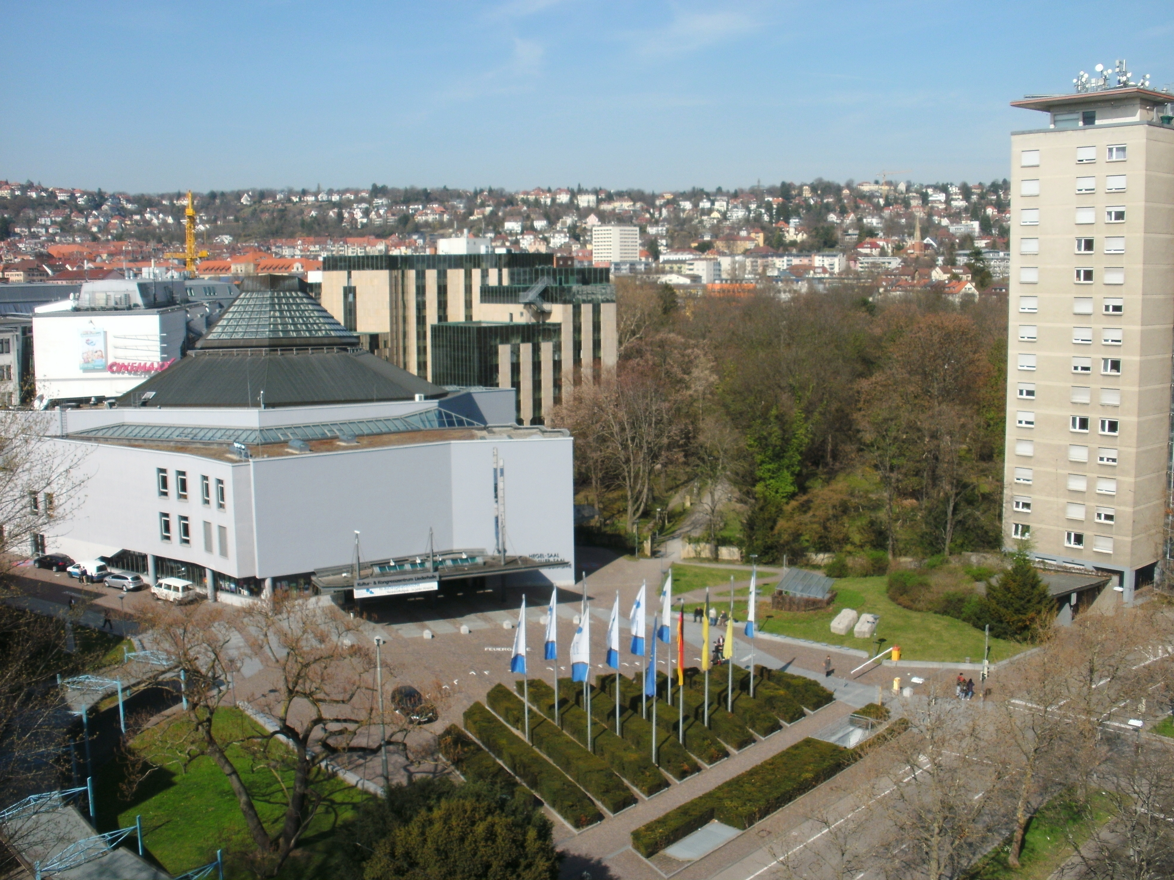 Berliner Platz